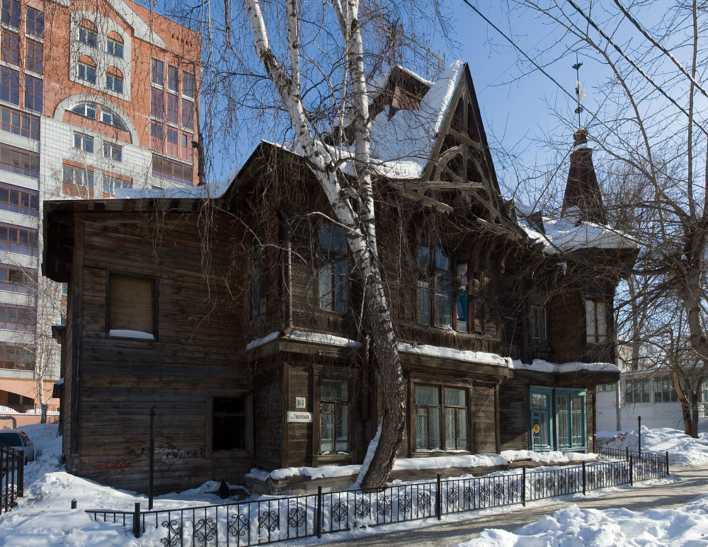 Дом жилой (деревянный) (Томская область, Томск, Тверская улица, 66)